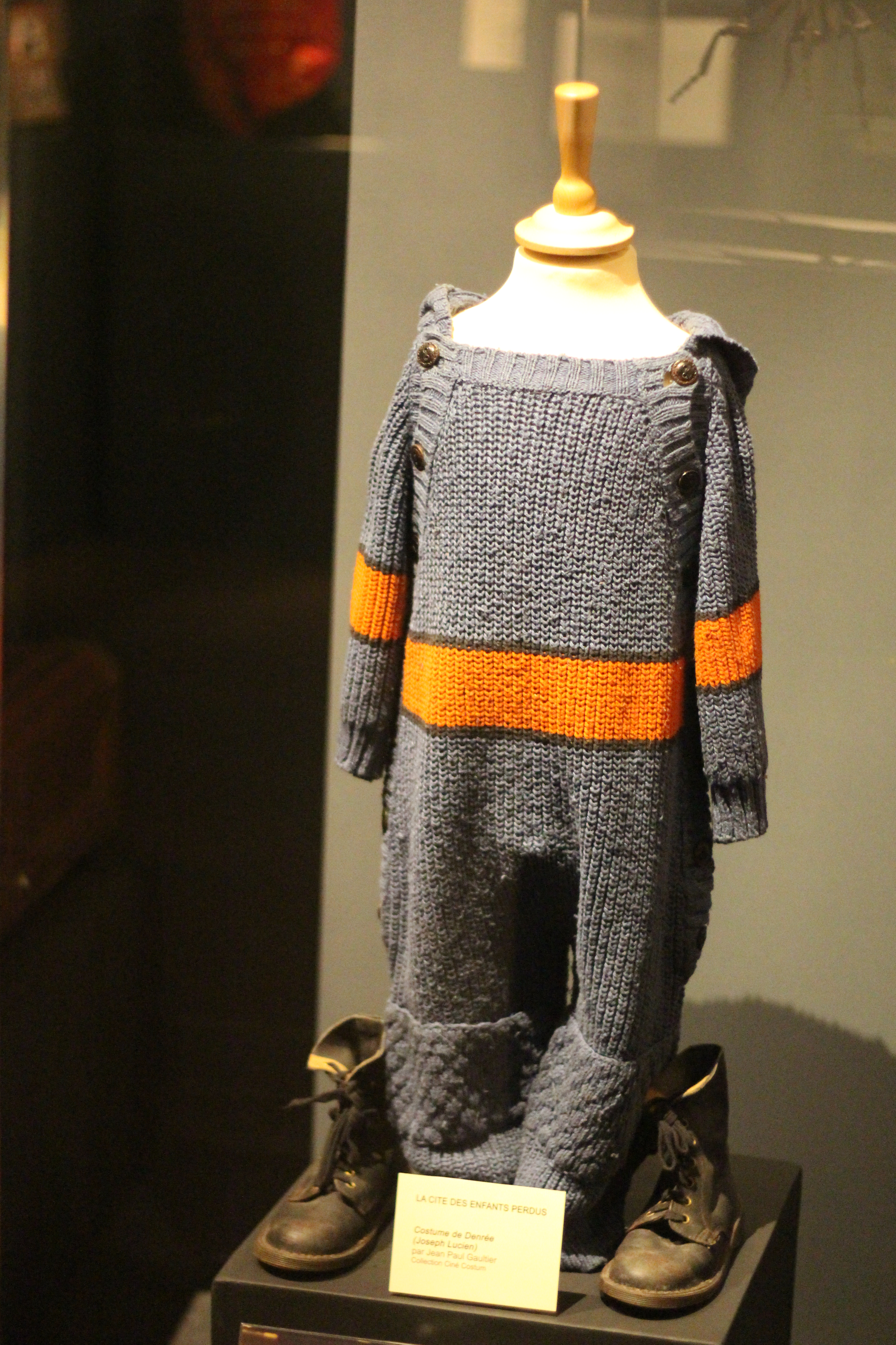 Costume de Denrée (joué par Joseph Lucien) dans le film La Cité des enfants perdus (costume créé par Jean-Paul Gaultier). Exposition "Caro/Jeunet" au musée Minature et Cinéma en 2018-2019.